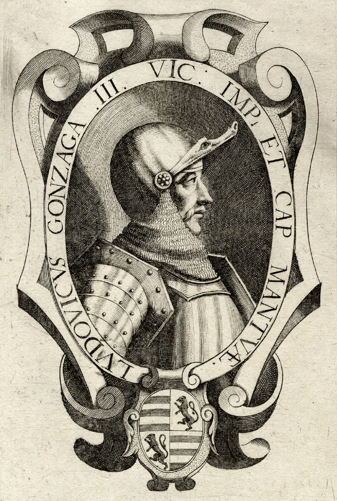 Portrait aus einer Serie von Gonzaga-Portraits, Kupferstich, 17. Jh.; Luigi III.